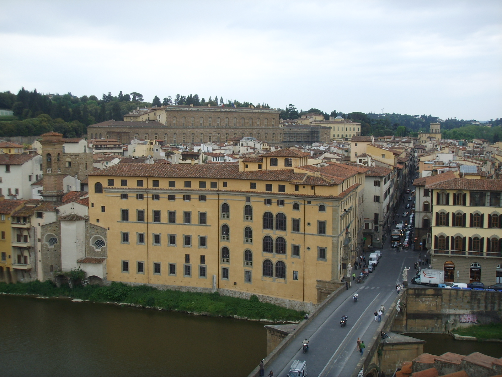 Torre dei gianfigliazzi, veduta, palazzo della missione e palazzo pitti